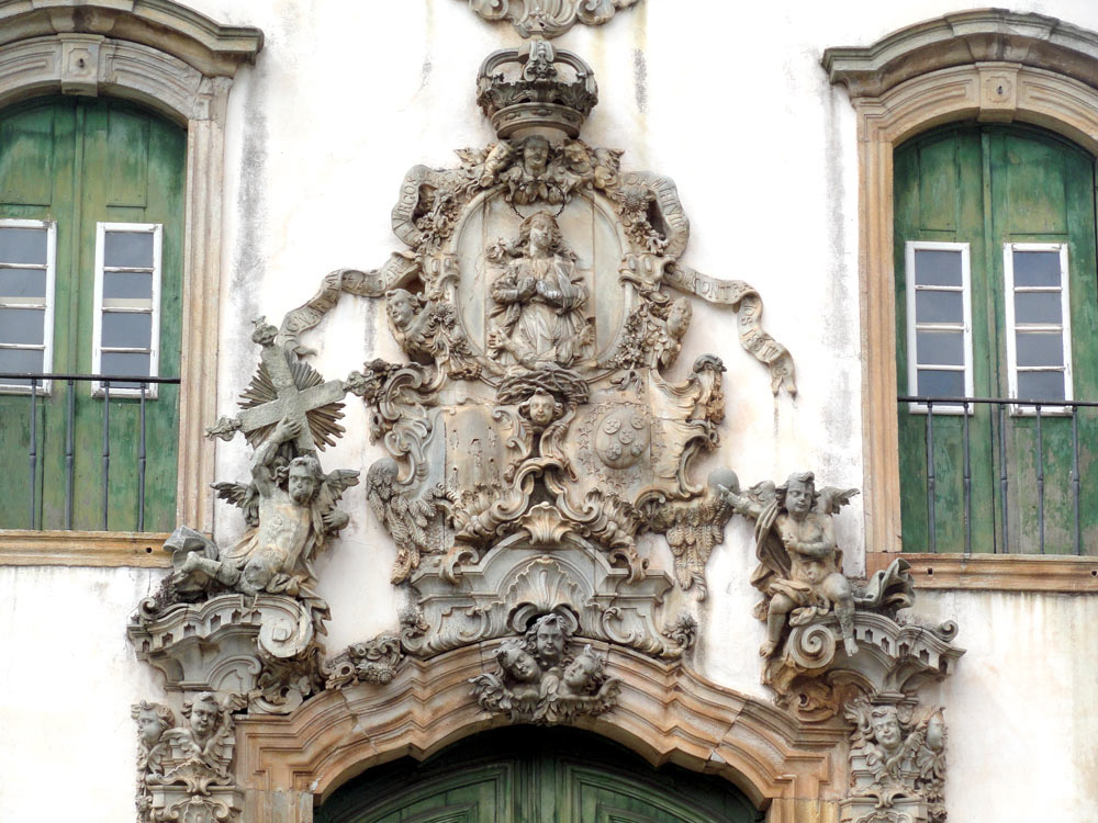 Relevo na portada da Igreja de S. Francisco, Ouro Preto, obra de Aleijadinho.